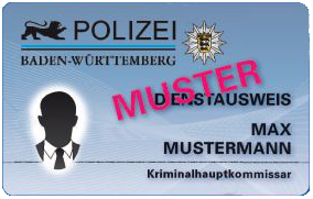 Vorderseite des 2011 eingeführten Dienstausweises der Polizei Baden-Württemberg